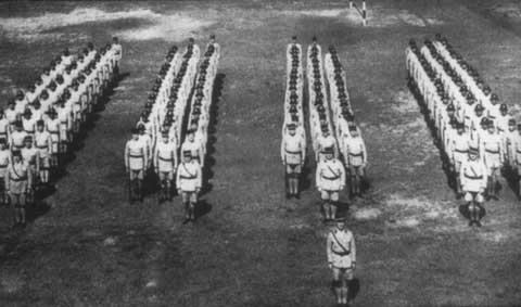 中文（中国大陆）: 20世纪30年代淮海路租界的巡捕，其成员就包括为数众多的中国人。